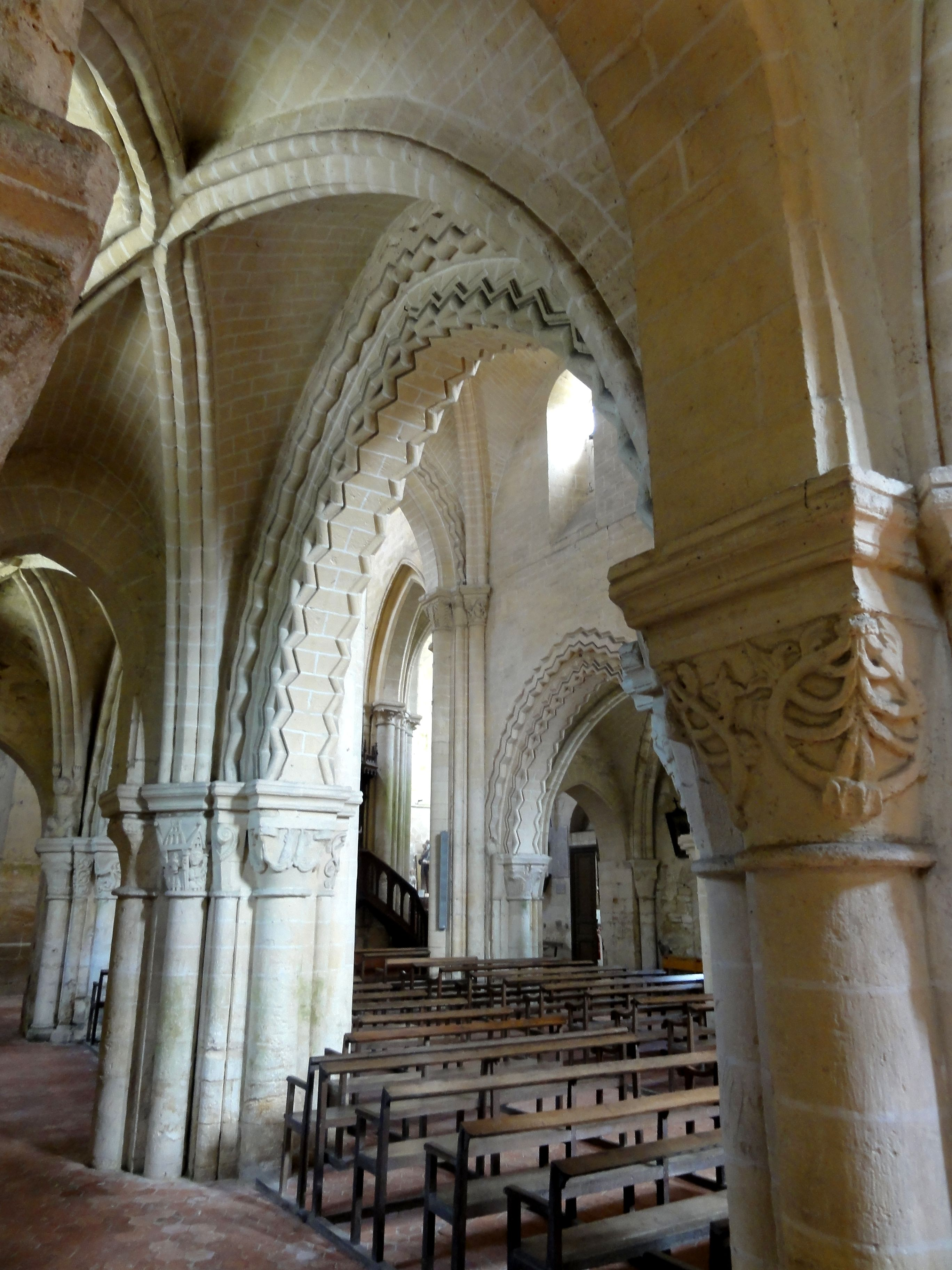 Bas-côté sud, deuxième grande arcade.